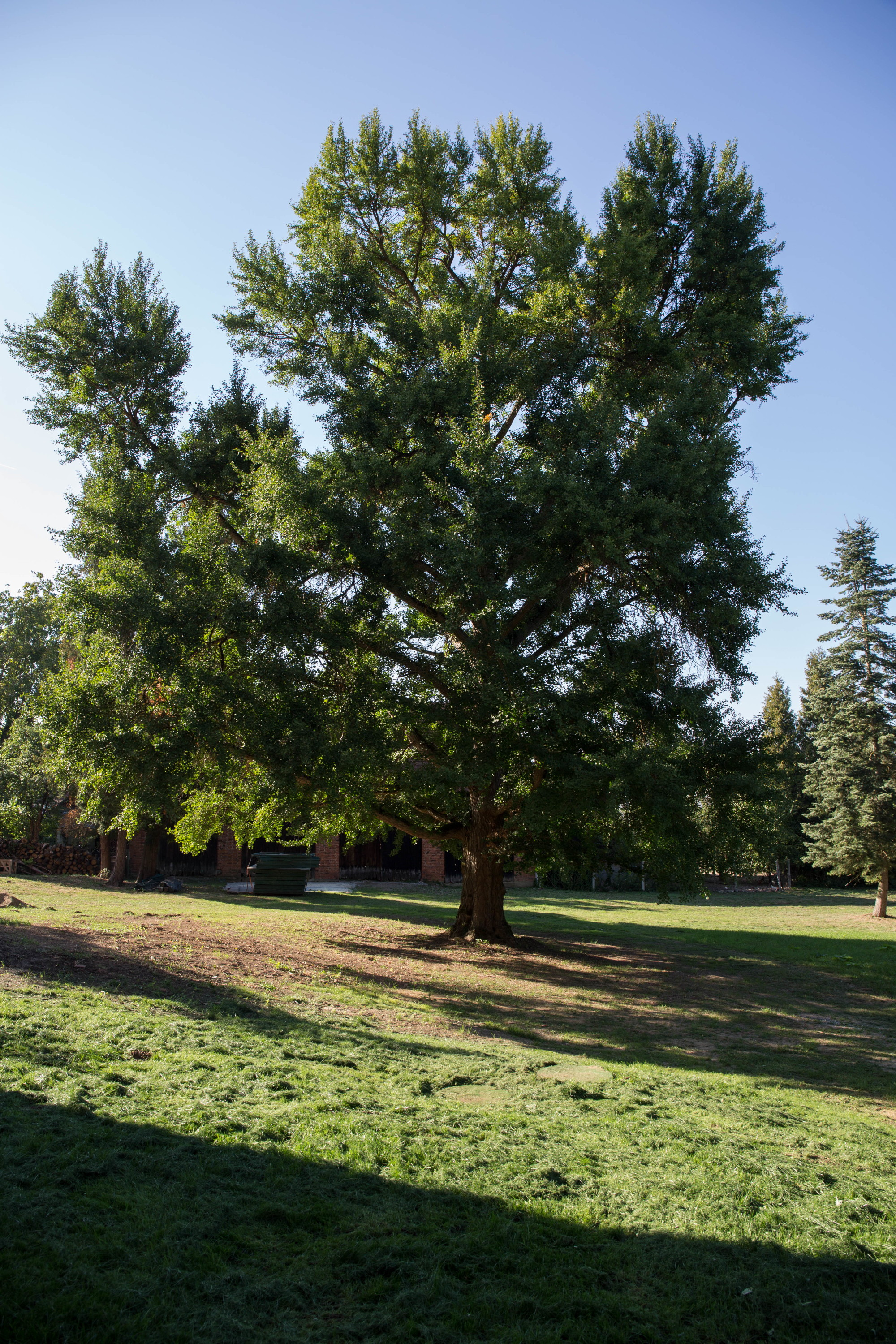 Gingko biloba This media shows the natural monument in the Burgenland with the ID OW-055.